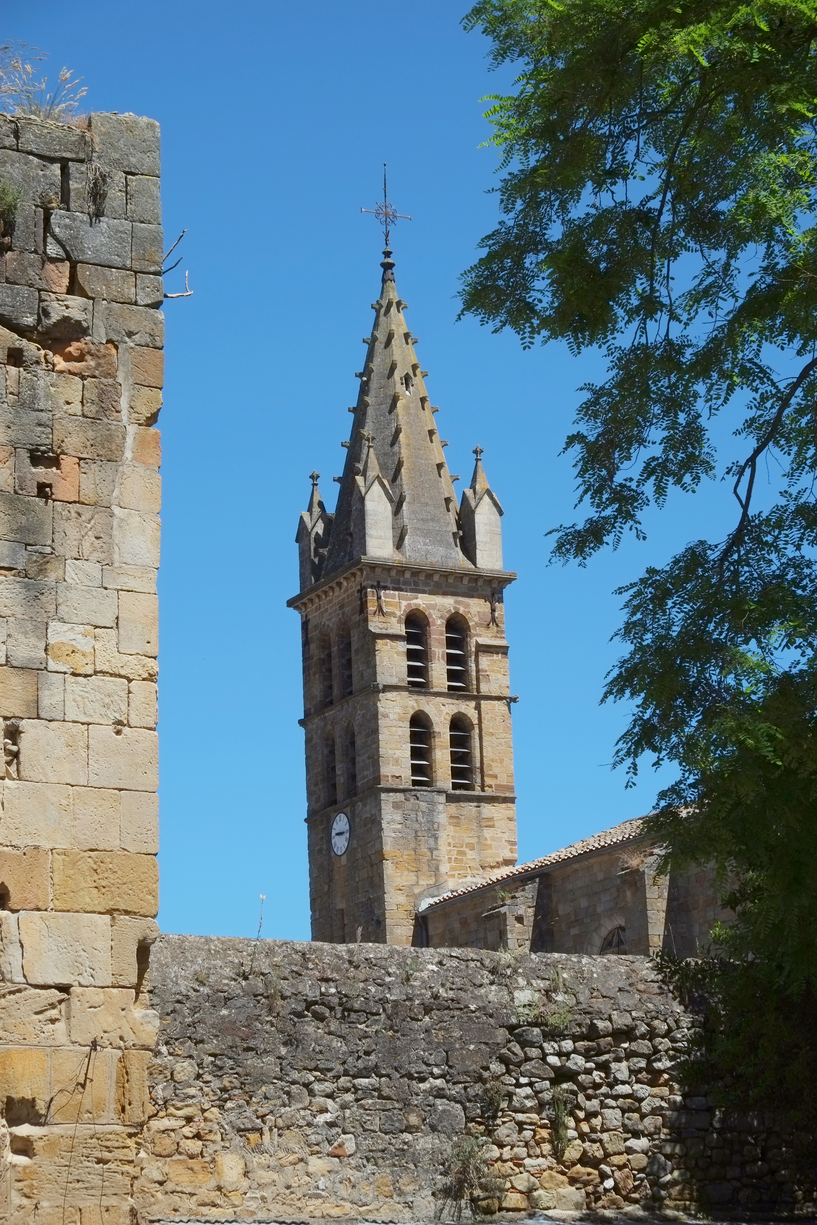 Ehemalige Abtei in Alet-les-Bains (Frankreich)